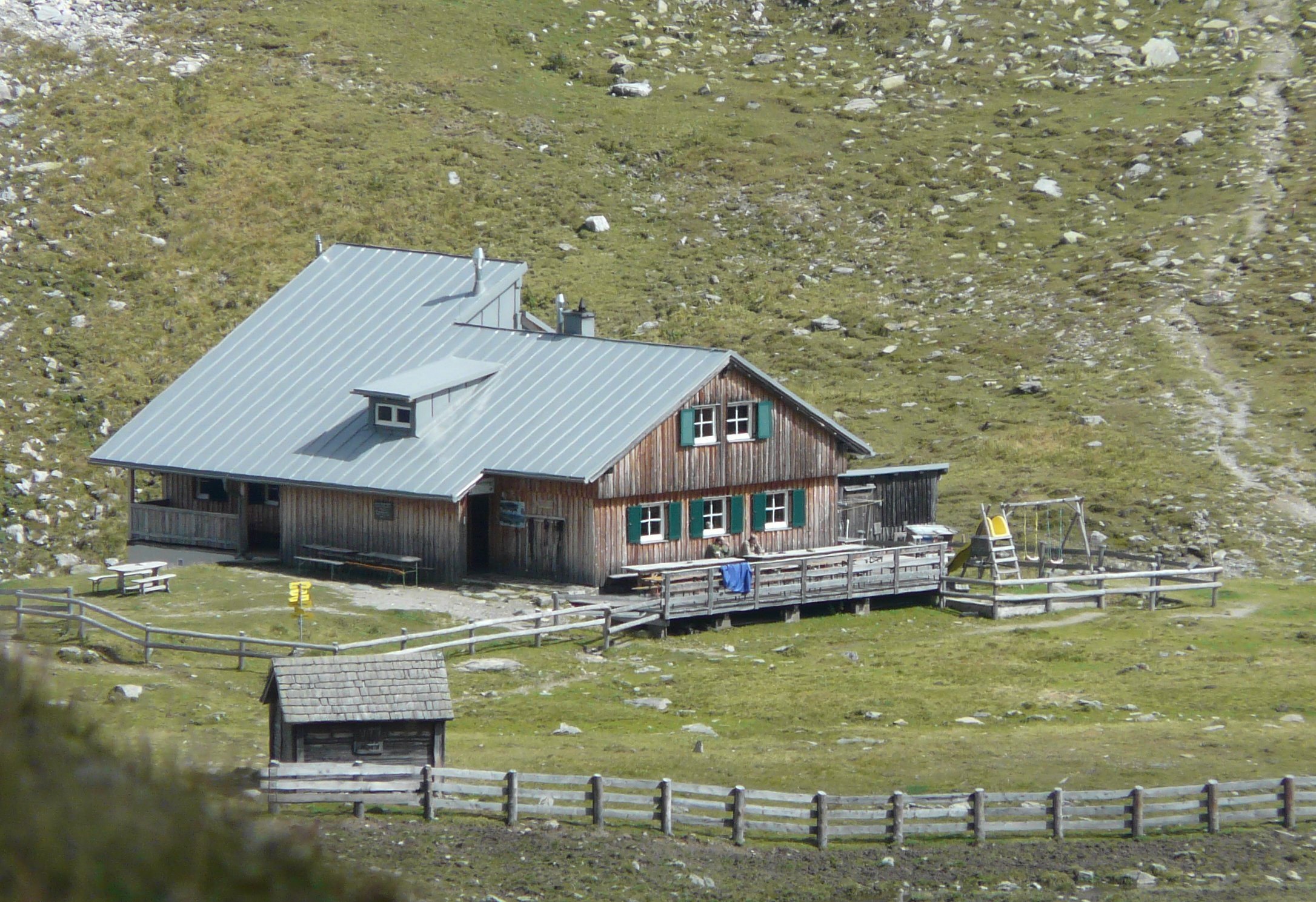 Die Obstanserseehütte am Karnischen Höhenweg.